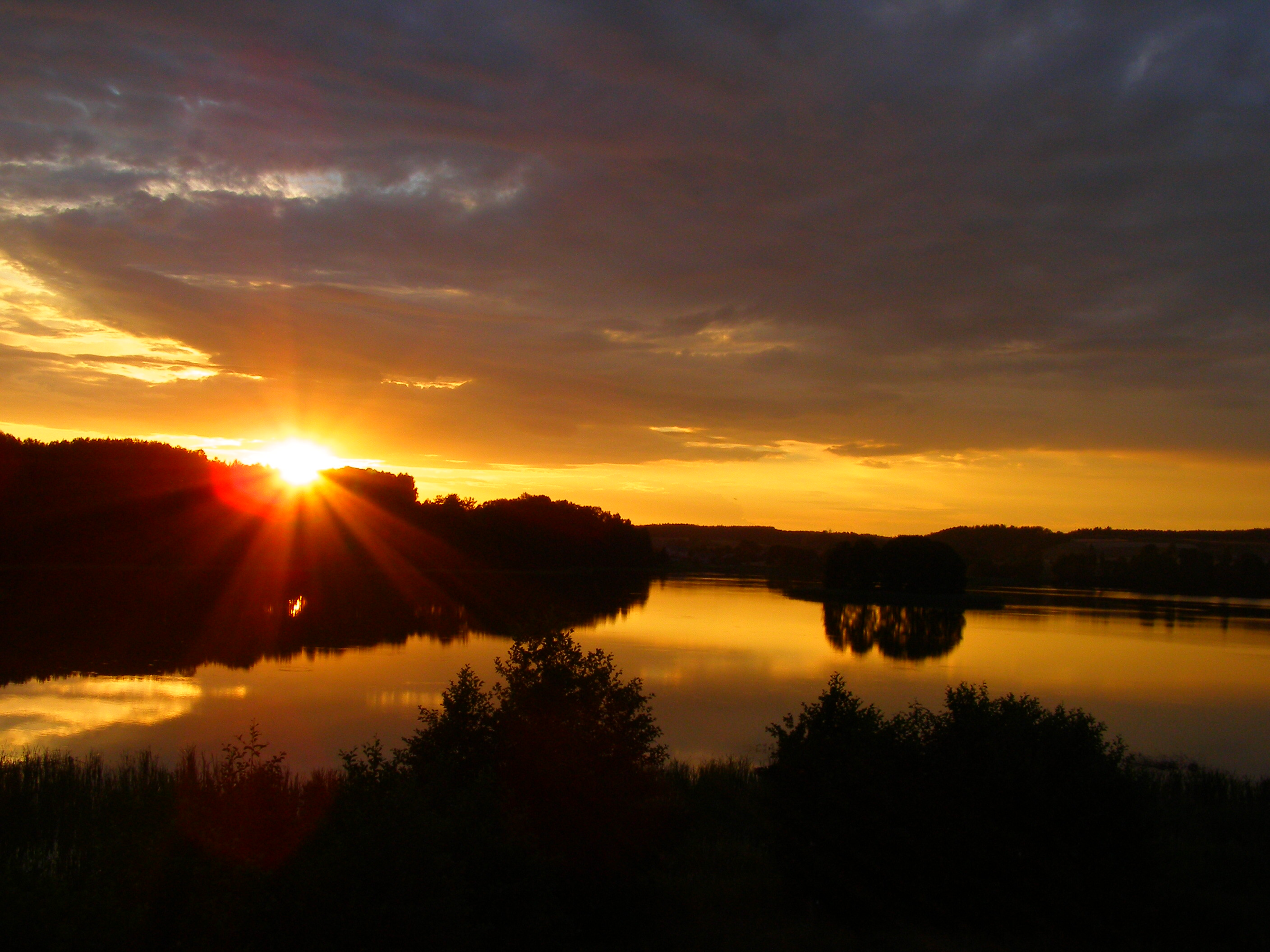 Zachód słońca nad jeziorem Raduń.